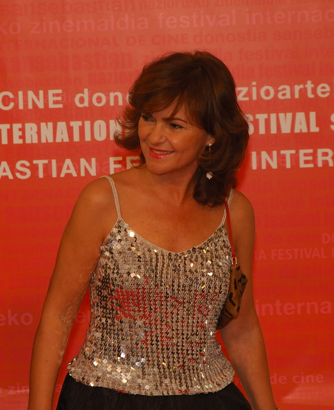 La ex ministra de Cultura española Carmen Calvo en el Festival Internacional de Cine de San Sebastián 2006